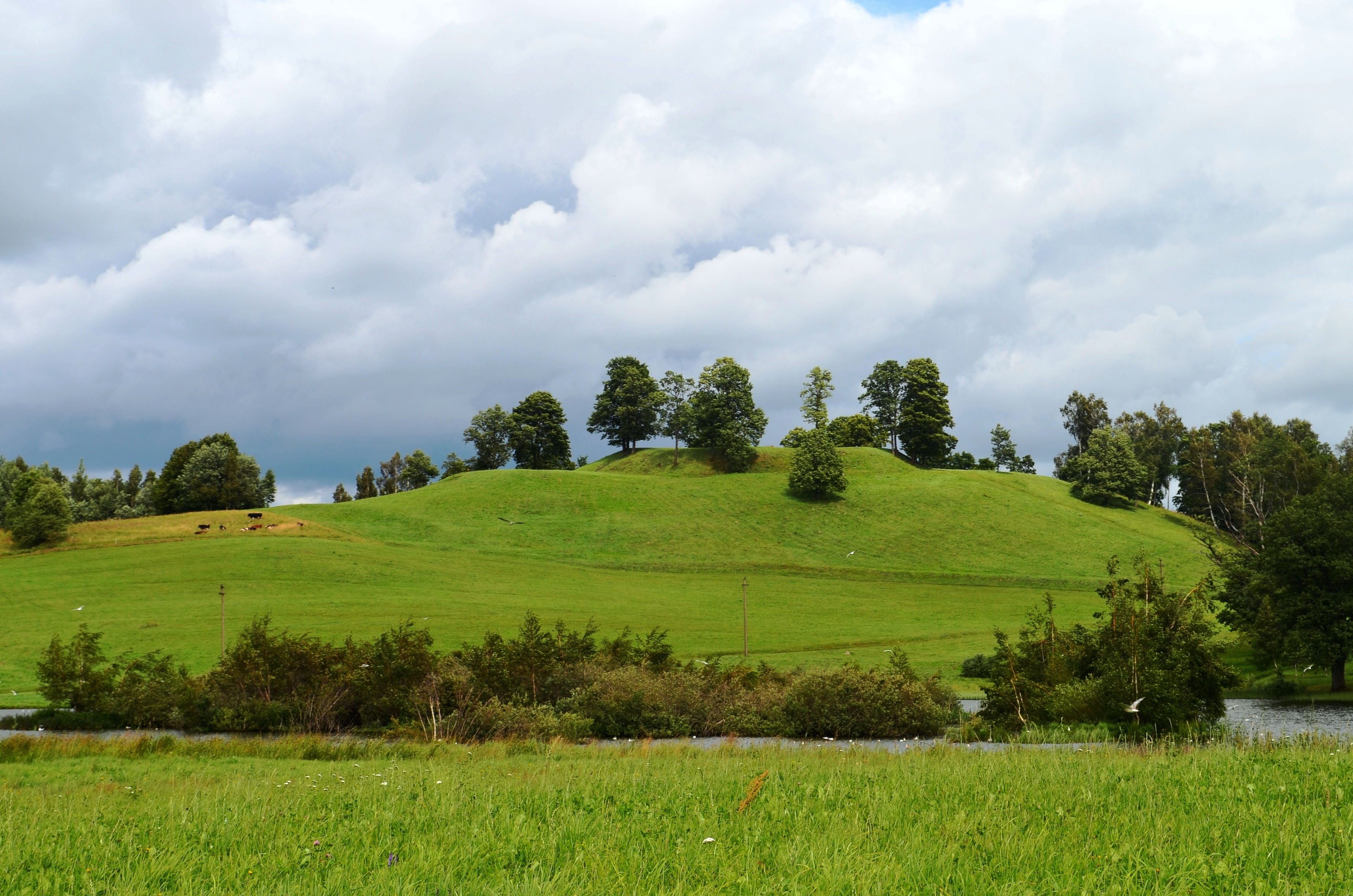 Bilionių piliakalnis (iš pietų), Šilalės r. Žemaitėška: Bėliuoniu pėliekalnis veizont ėš pėitū, Šėlalės raj.